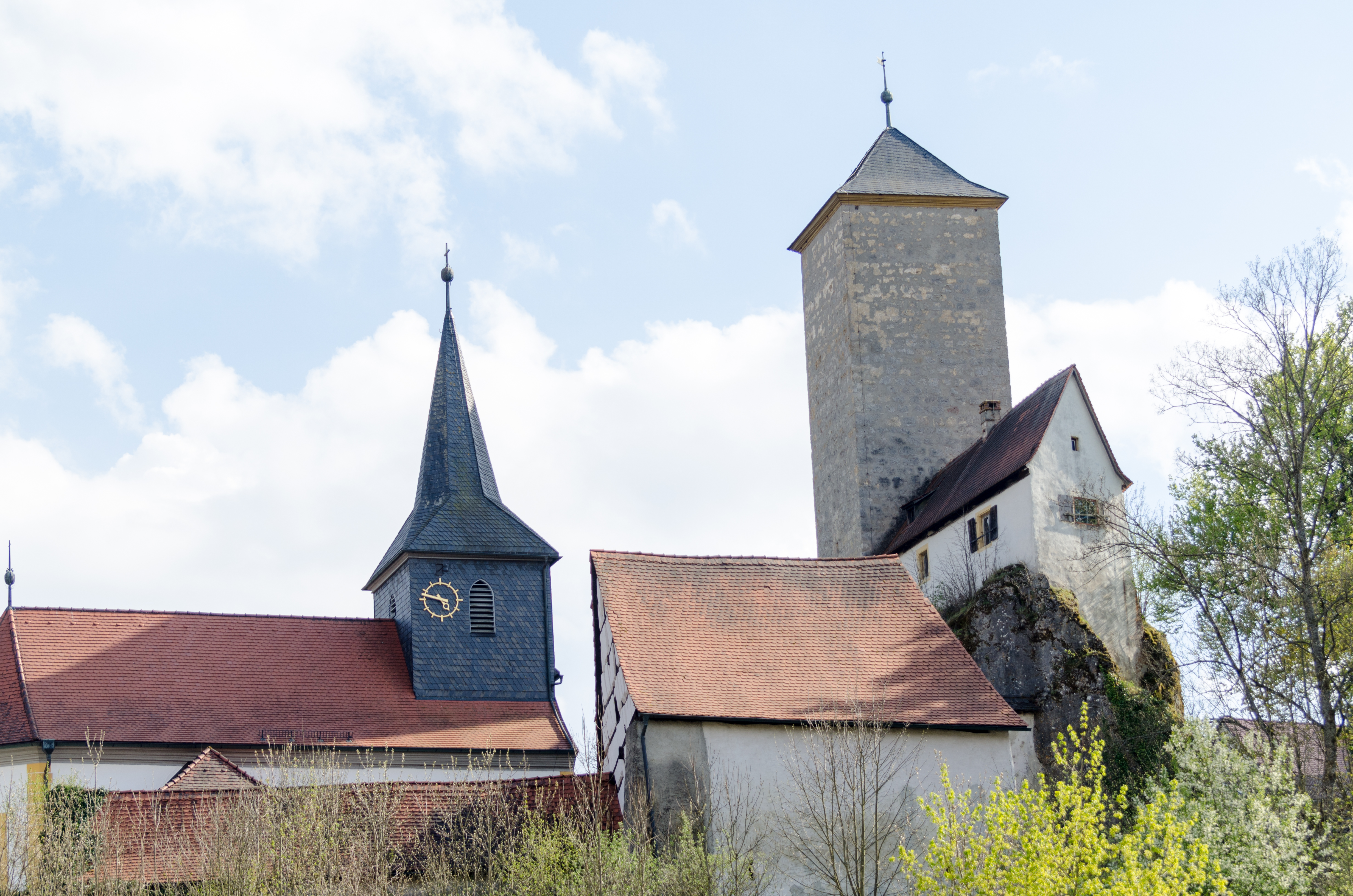 Aufseß, Schloss Unteraufseß-003 (2)